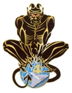 Insigne de la 4e batterie du 61e Régiment d'artillerie